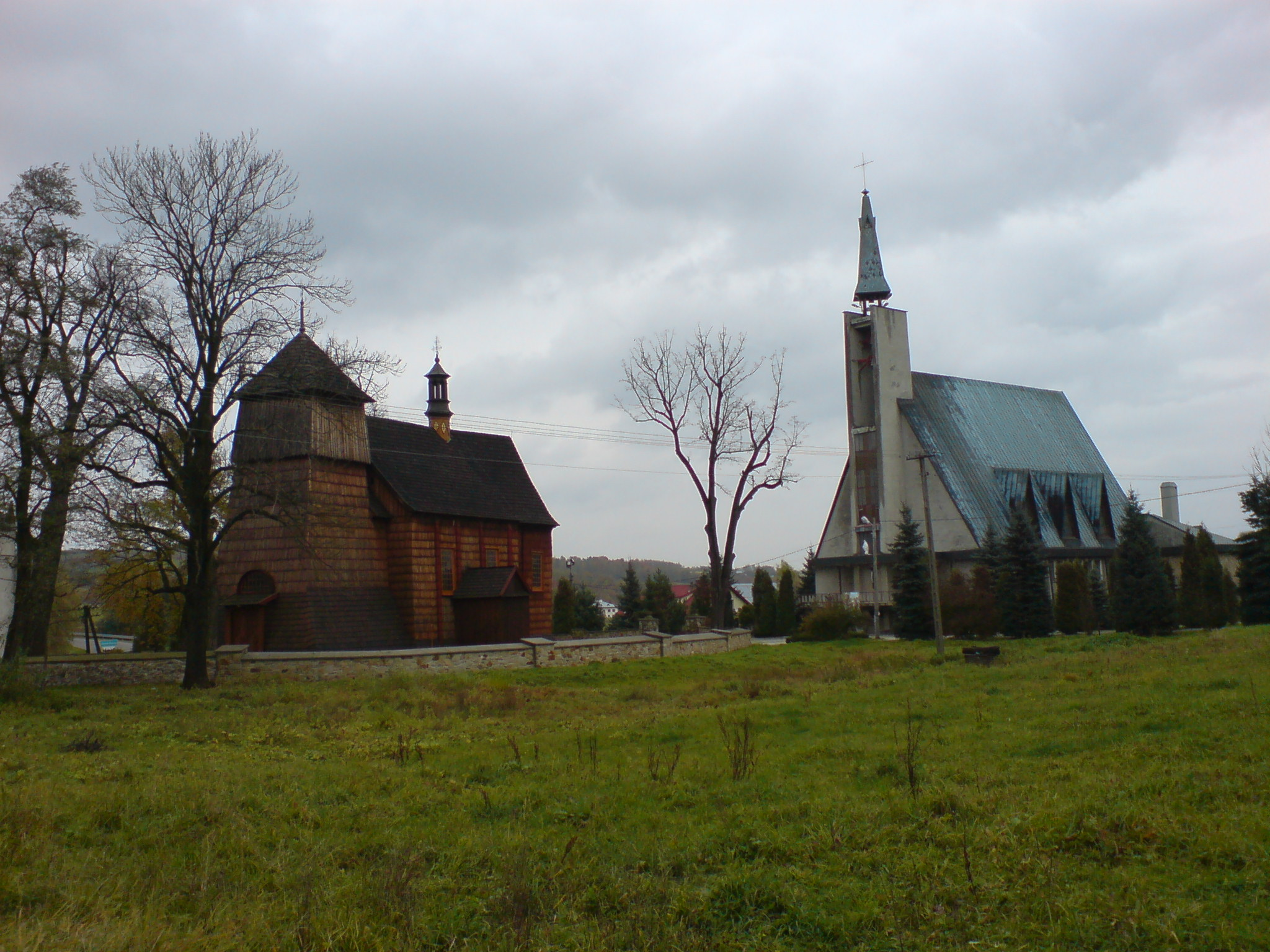 Kościoły w Gogołowie